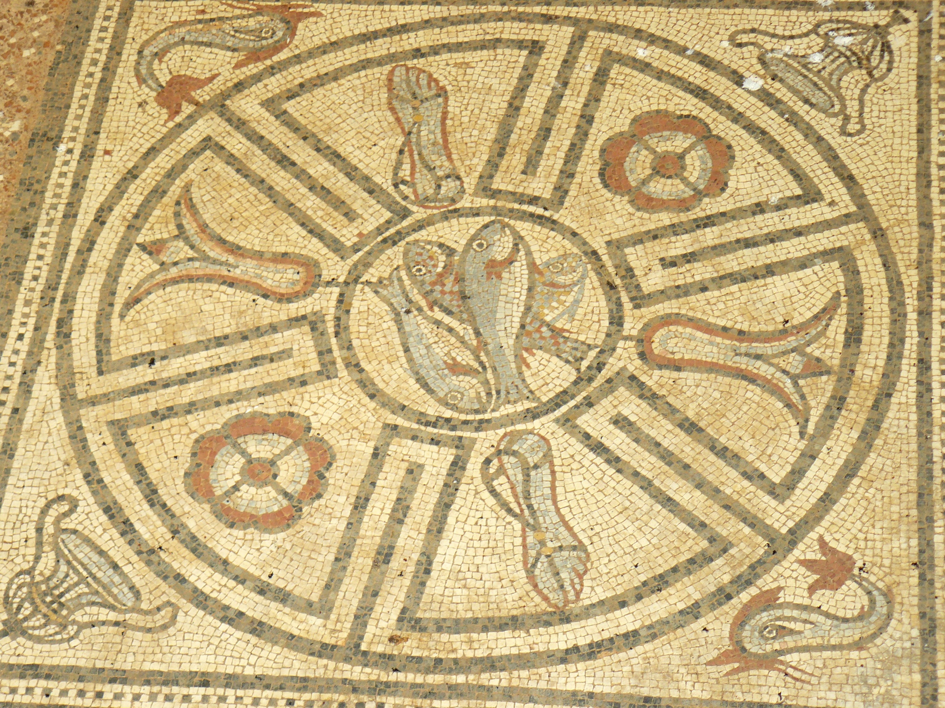 Mosaïque romaine de Jonvelle (Haute-Saône, France)